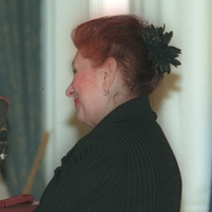 МОСКВА, КРЕМЛЬ. Церемония вручения Государственных премий в области литературы и искусства за 1999 год. Государственная премия вручается актрисе театра и кино Инне Ульяновой.